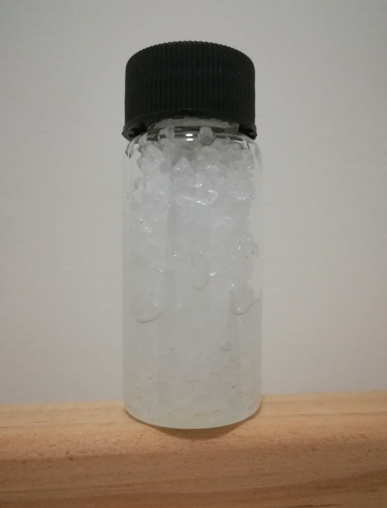 高碘酸（HIO4·2H2O）,≥99.0%